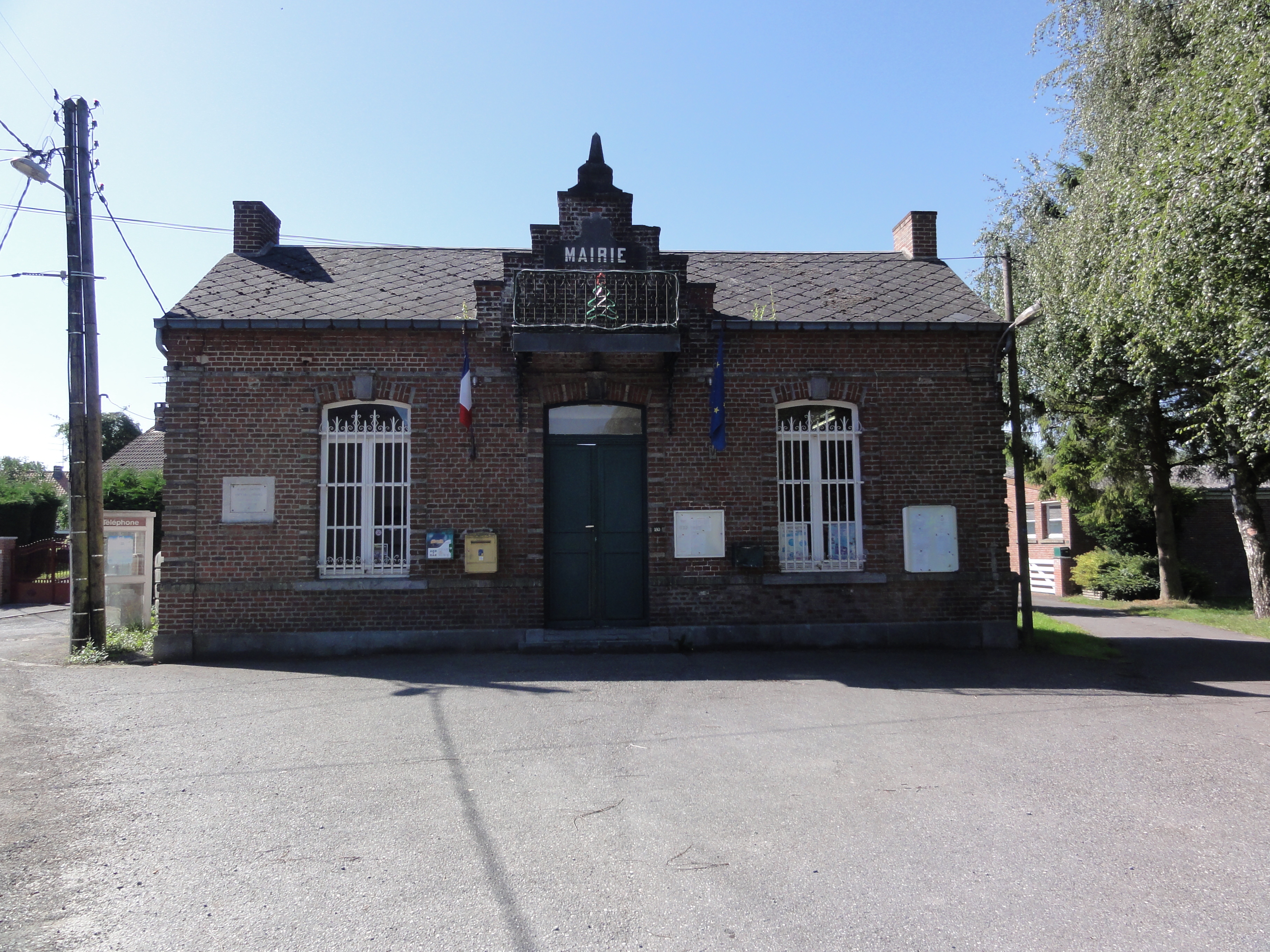 Audignies (Nord, Fr) mairie